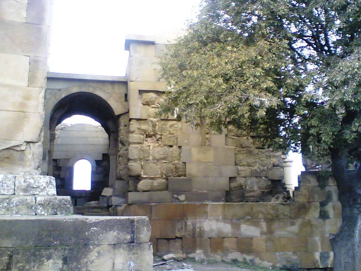 ჯვრის მონასტრის მცირე ტაძარი